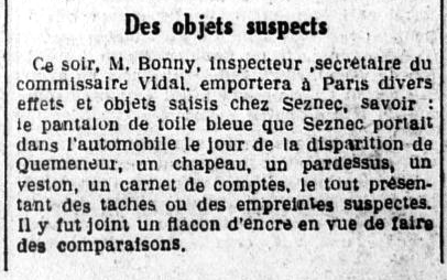 Dans un article titré "Les alibis de Seznec tombent les uns après les autres", L'Ouest-Éclair du 19 juillet 1923 fait état des avancées sur la preuve décisive de la machine à écrire. L'inspecteur Bonny, lui, n'y est mentionné que pour le transport de Bretagne à Paris de différents scellés de moindre importance.